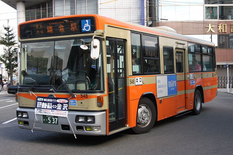 Enoshima Electric Railway's Route Bus (Car No.548 / Nissan Diesel KL-RP252GAN / NSK 96MC body) at Kamakura Station, Kamakura, Kanagawa, Japan.